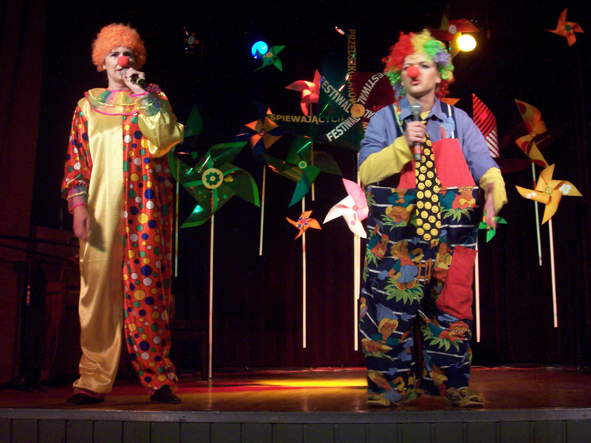 Festiwal Śpiewających Przedszkolaków w CK Agora.